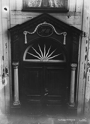 Knudtzongården i Kristiansund. Fru Knudtzons portal.